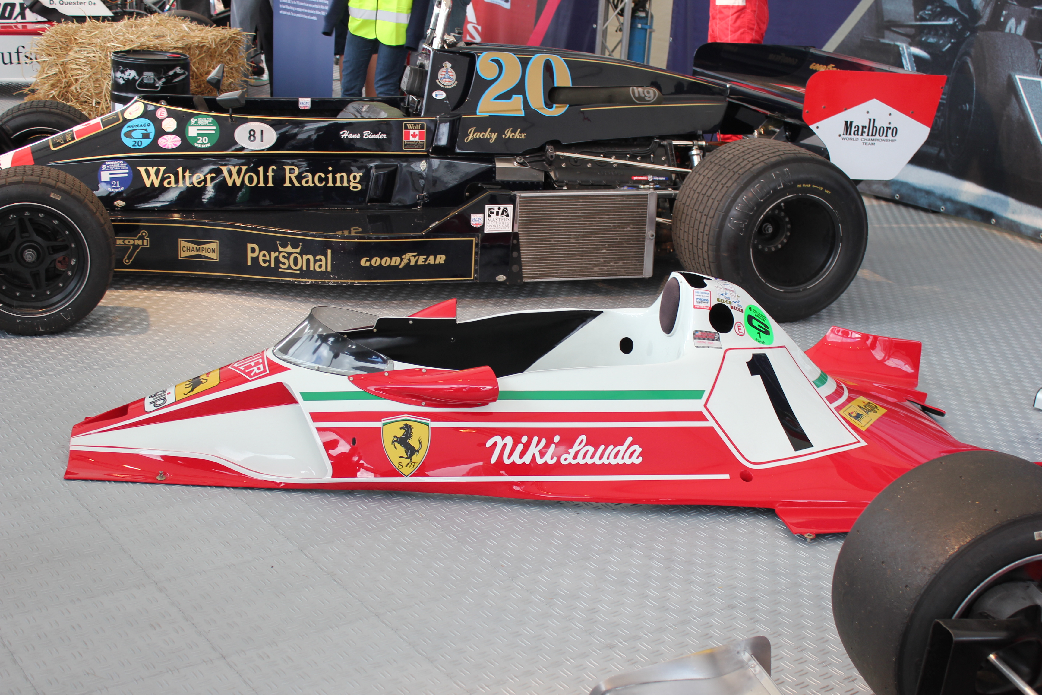 Die Abdeckung eines Ferrari 312T2 seitlich